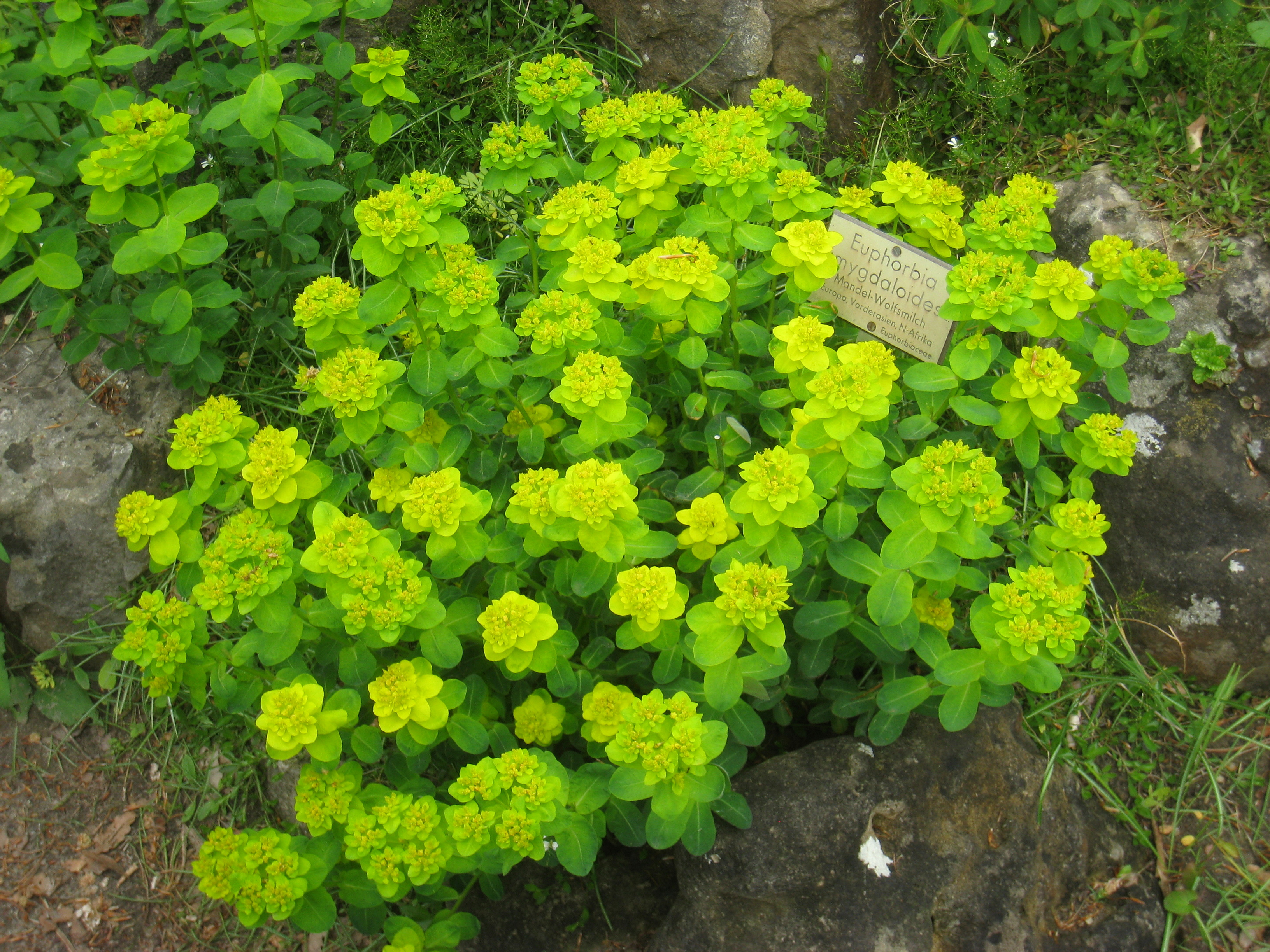 Euphorbia amygdaloides specimen, in the Botanischer Garten, Berlin-Dahlem (Berlin Botanical Garden), Berlin, Germany.